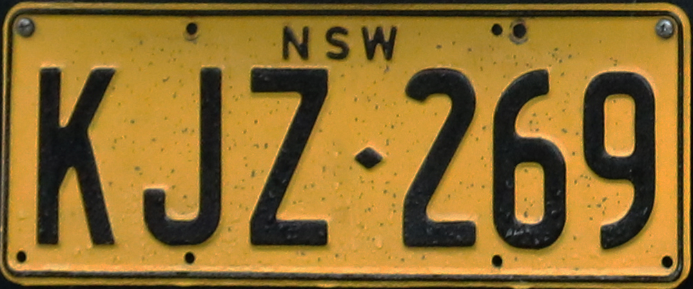 Saab 900 EMS